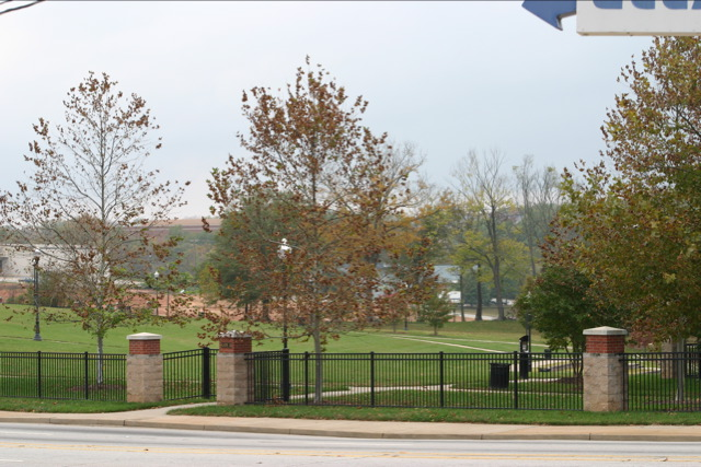 Barnett Park